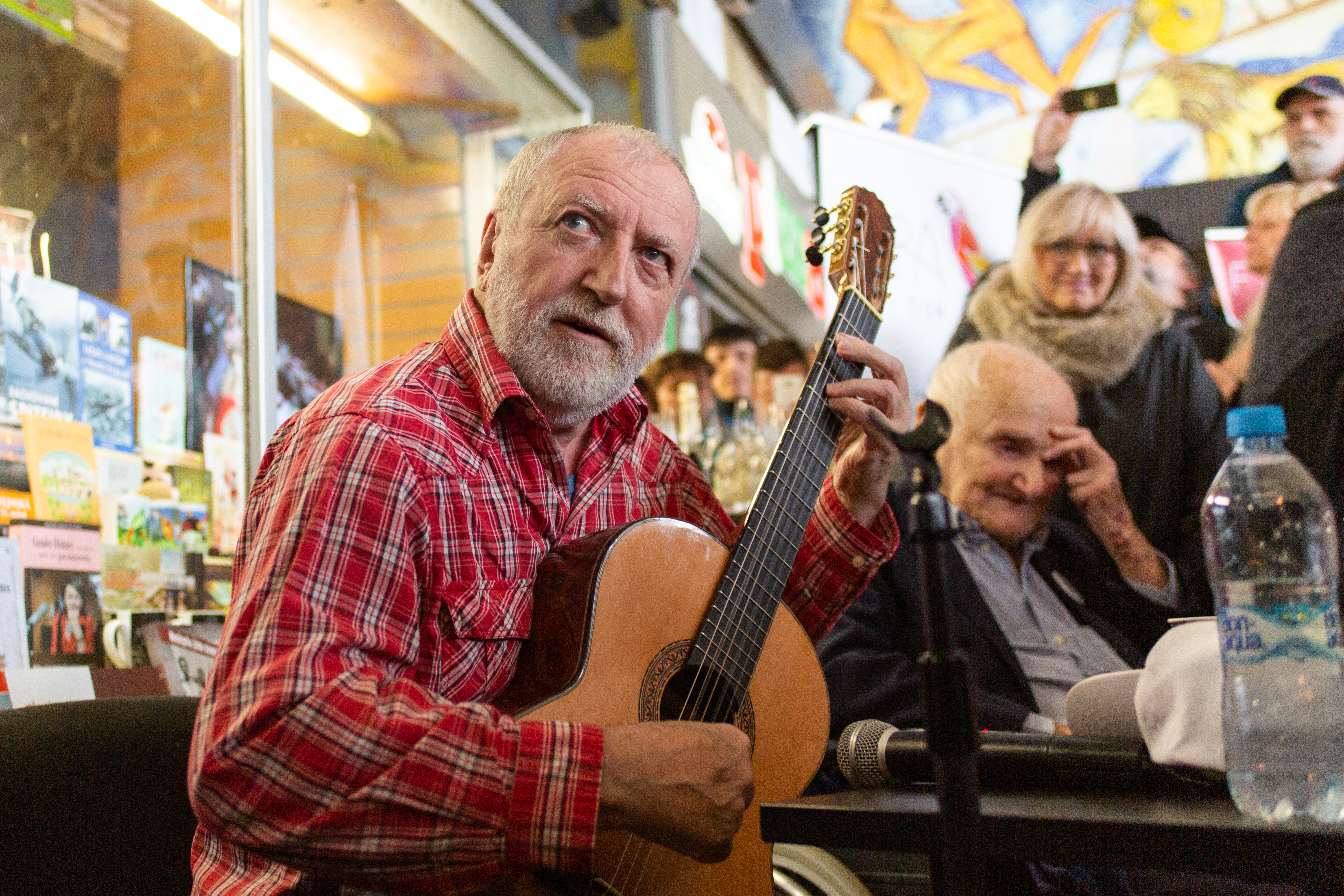 Hudební virtuos - kytarista Štěpán Rak hraje na křtu knihy Jindry Hojera Záhadné hlavolamy pro chytré hlavičky.